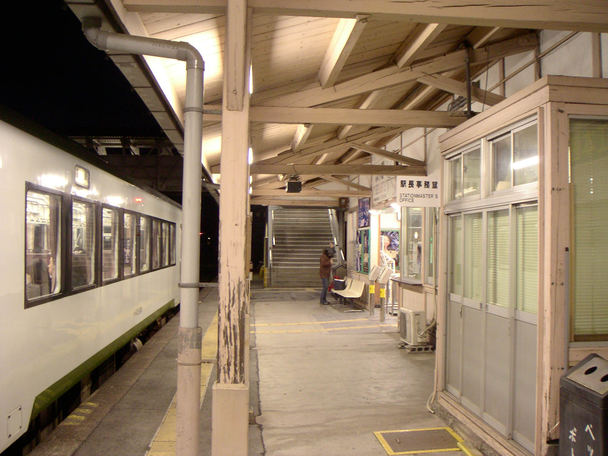 Gunma-Fujioka Station, Hachikō Line, JR, Japan八高線群馬藤岡駅